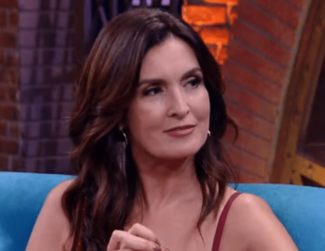 A apresentadora e jornalista Fátima Bernardes no programa "Lady Night", em 2019